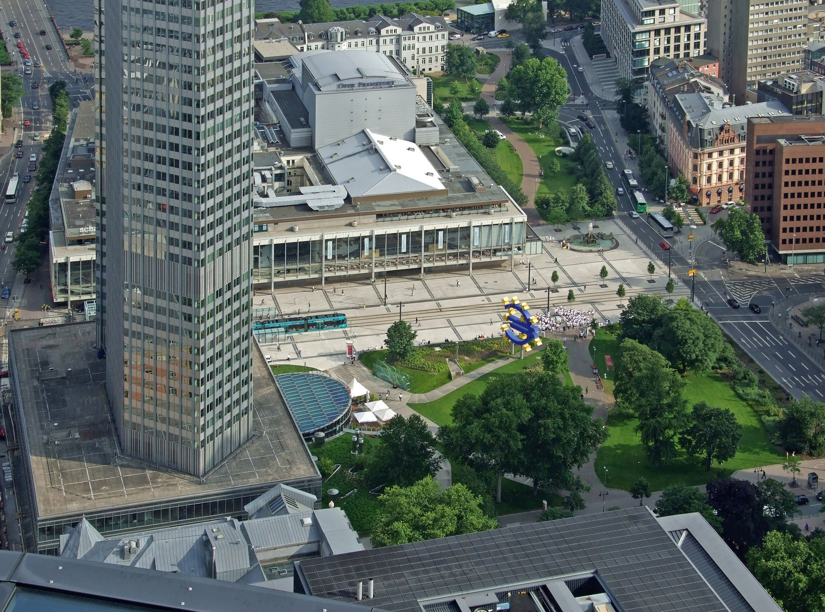 Willy-Brandt-Platz, zwischen Staedtischen Buehnen und Eurotower in Ffm